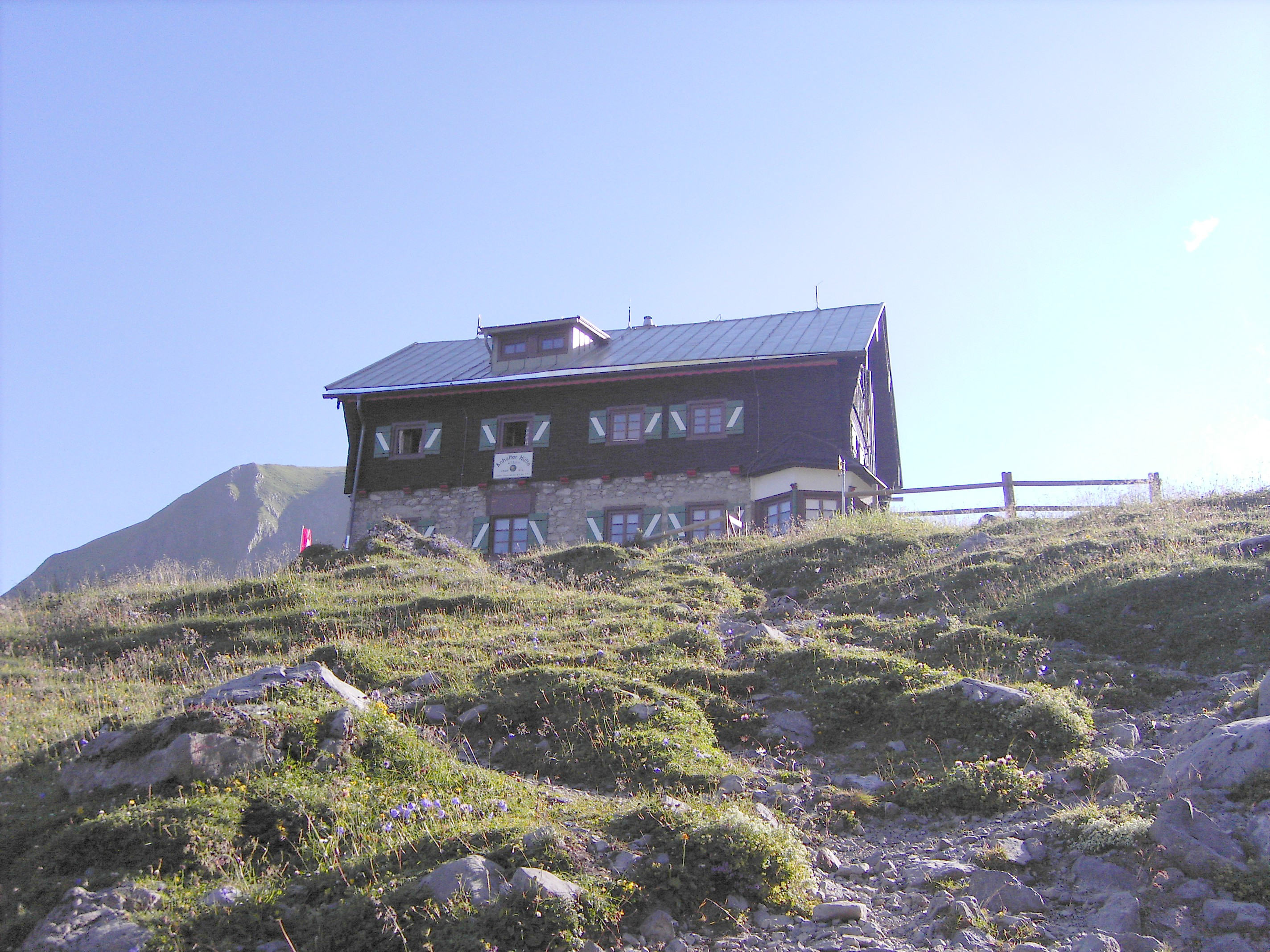 Anhalter Hütte im Jahre 2007